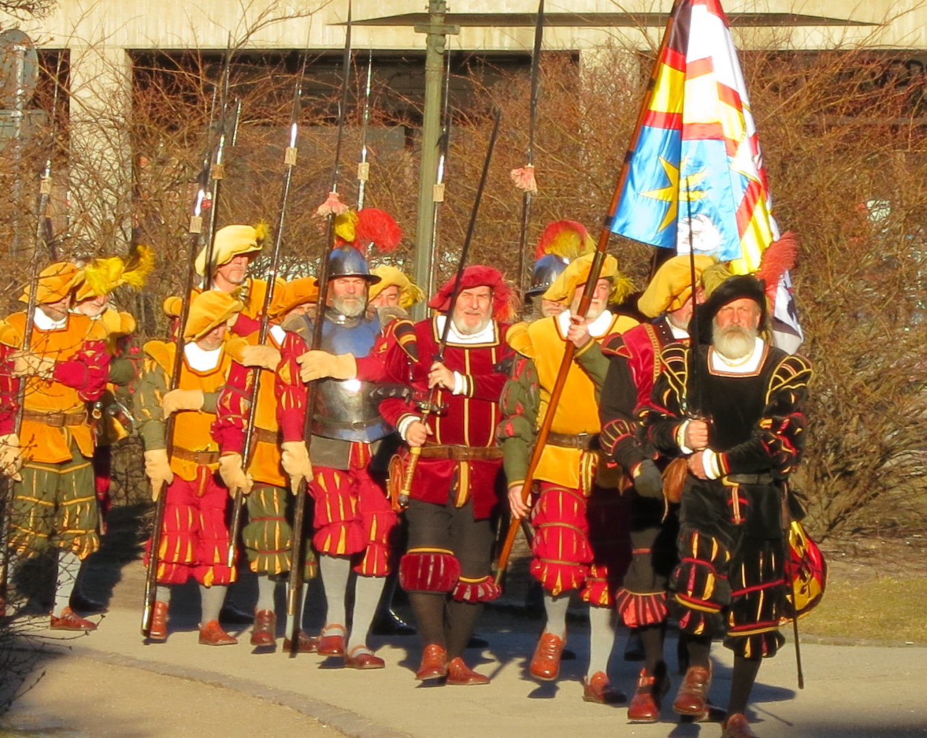 Malmöhusgardet i uniformer från 1500-talet